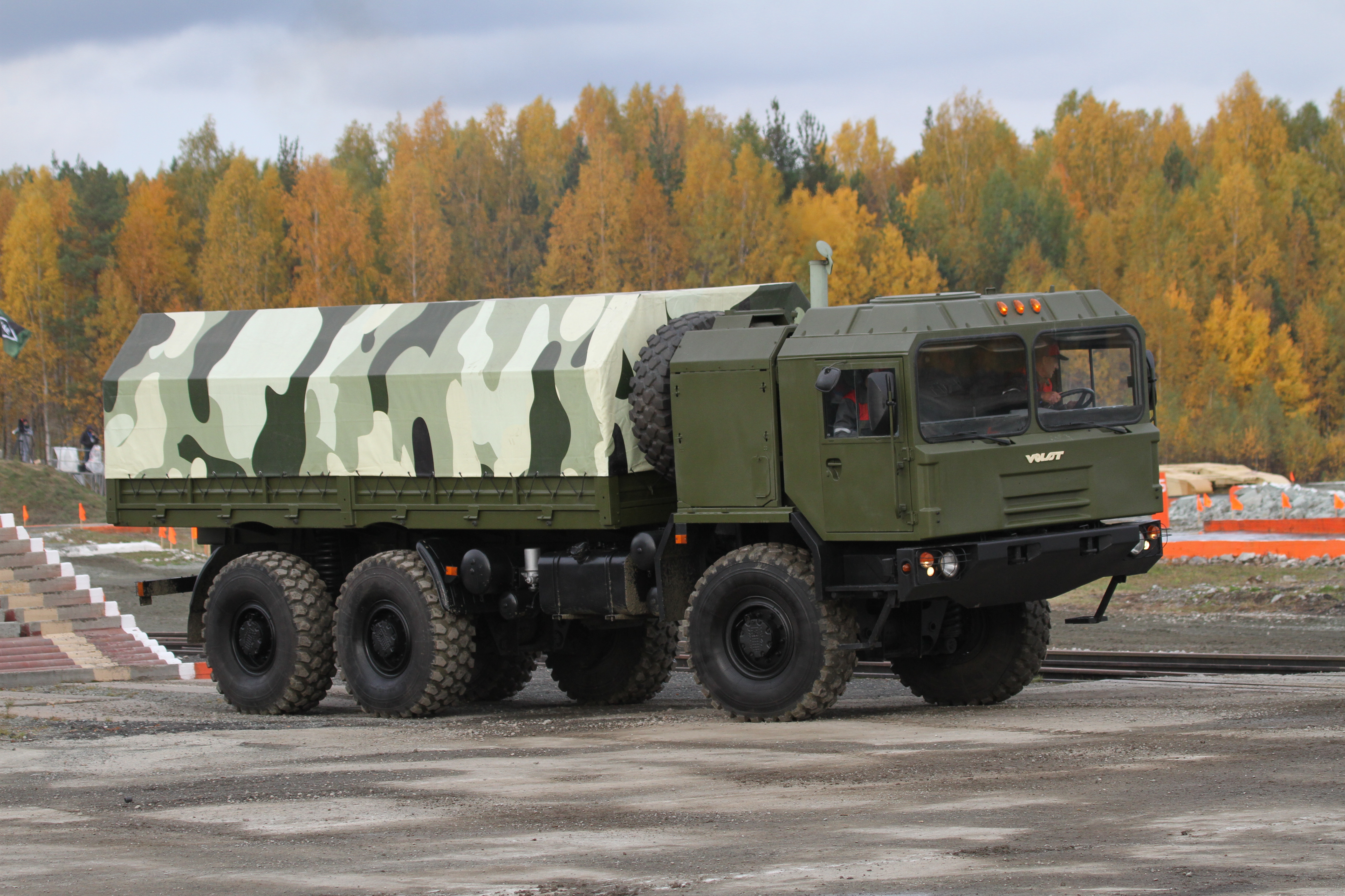 Бортовой автомобиль МЗКТ-6001 (MZKT-6001)